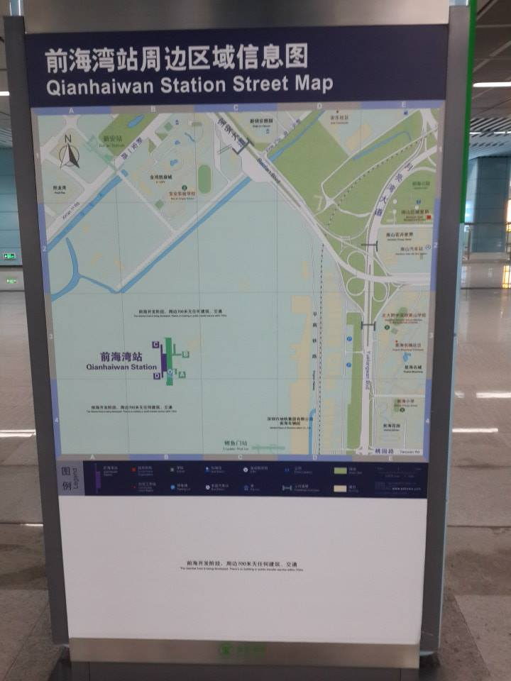 前海灣站地圖